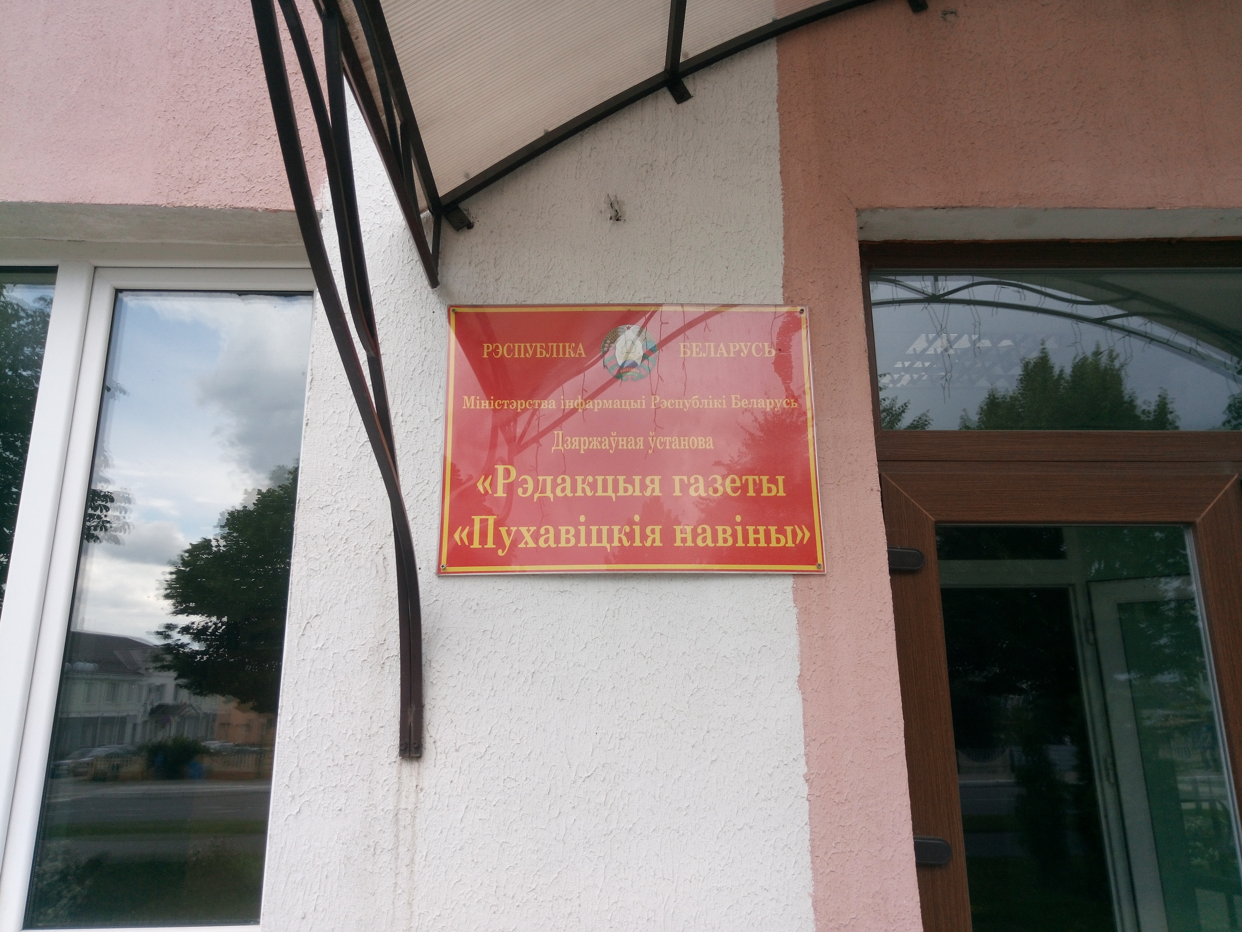 Таблічка рэдакцыі газеты «Пухавіцкія навіны»